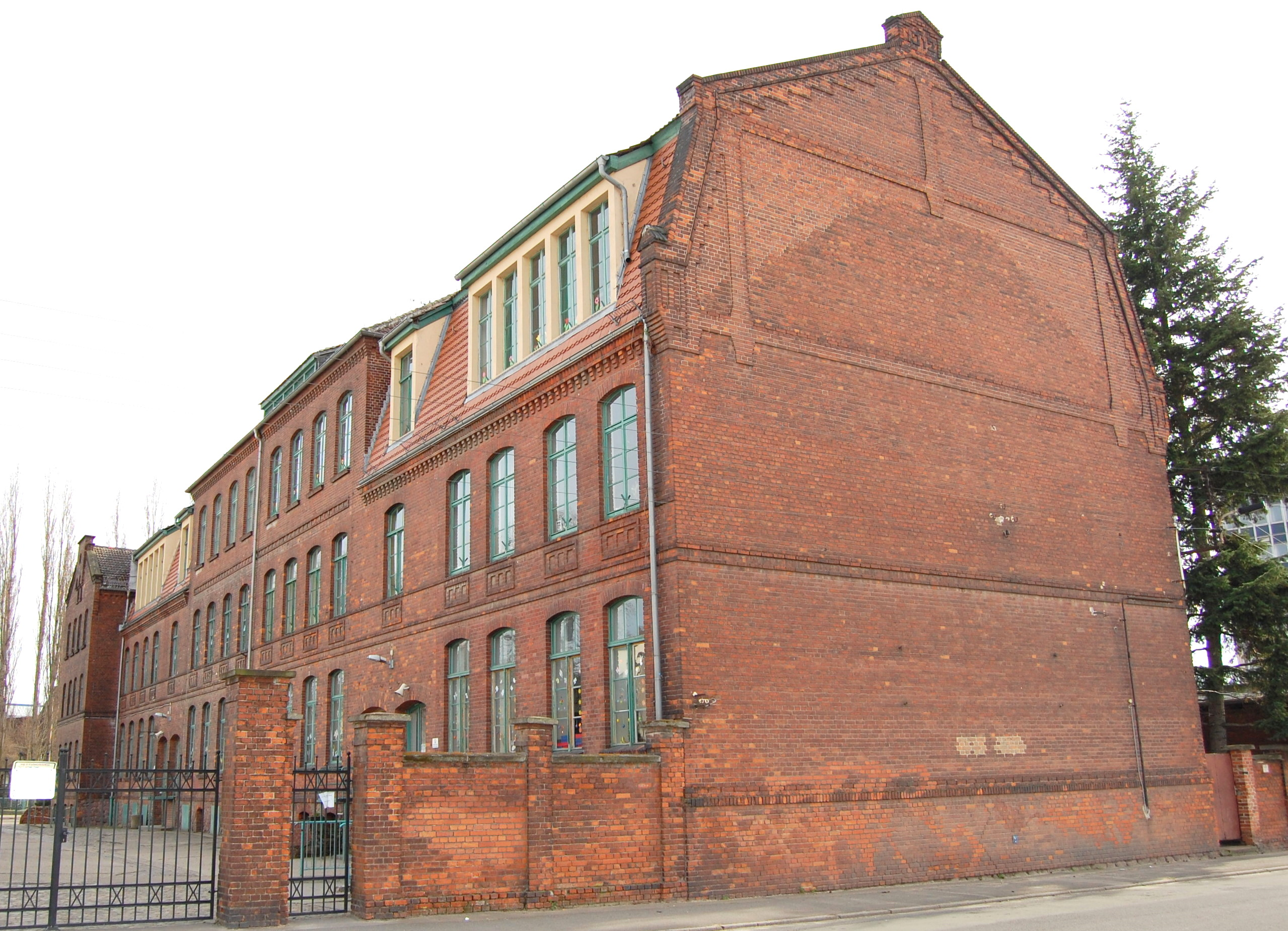 Grundschule Fermersleben, Blick von Nordosten, Friedrich-List-Straße